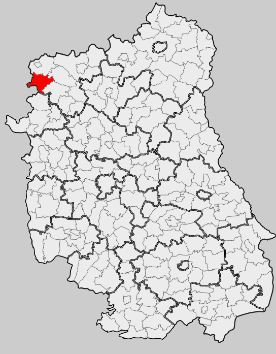 Map of gmina Wola Mysłowska, Łuków county, Lublin voivodship Mapa gminy Wola Mysłowska, powiat łukowski, województwo lubelskie